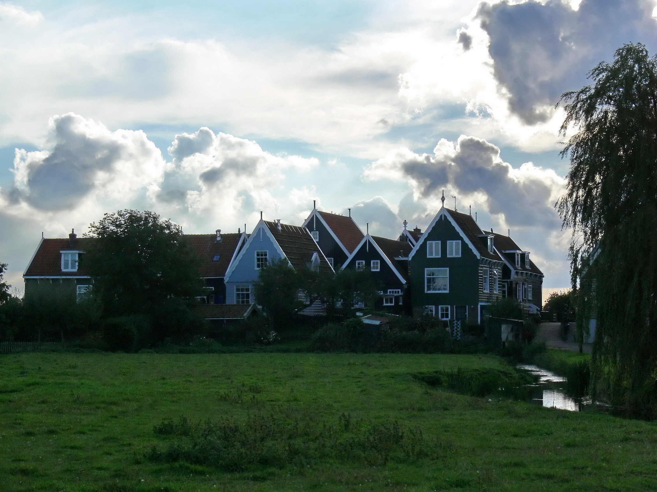 Het betreft hier de Wittewerf, een deels bebouwde terp uit de Late Middeleeuwen. De overblijfselen bevinden zich vrijwel direct onder de grasmat en de huidige bebouwing en bestaan onder meer uit oude fun- deringen, ophogingslagen en afgedankt huisraad. Aangezien deze een bijdrage leveren aan de bewoningsgeschiedenis van het gebied, wordt in principe behoud van dit terrein nagestreefd.